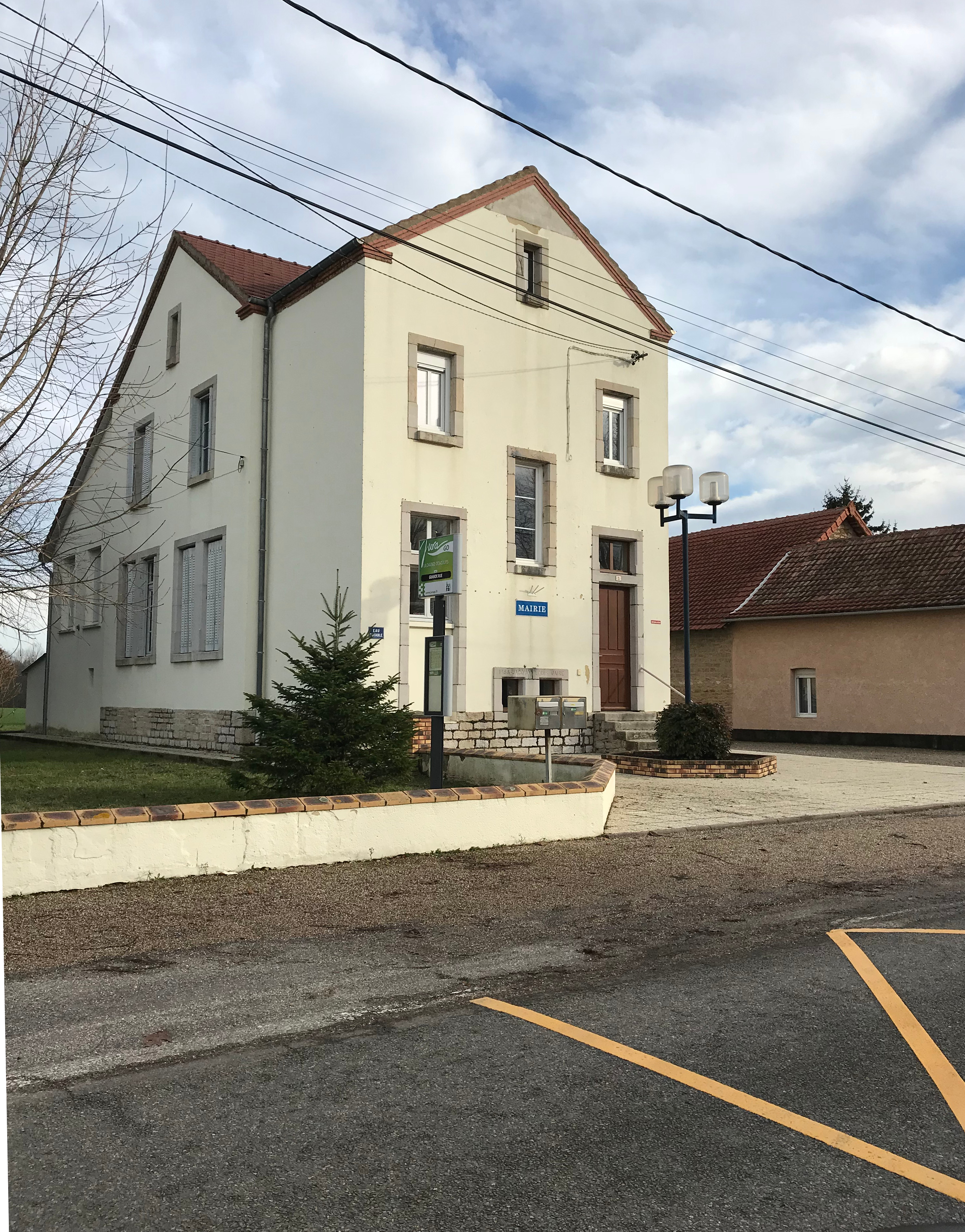 Image de Chaînée-des-Coupis (Jura, France) en janvier 2018.